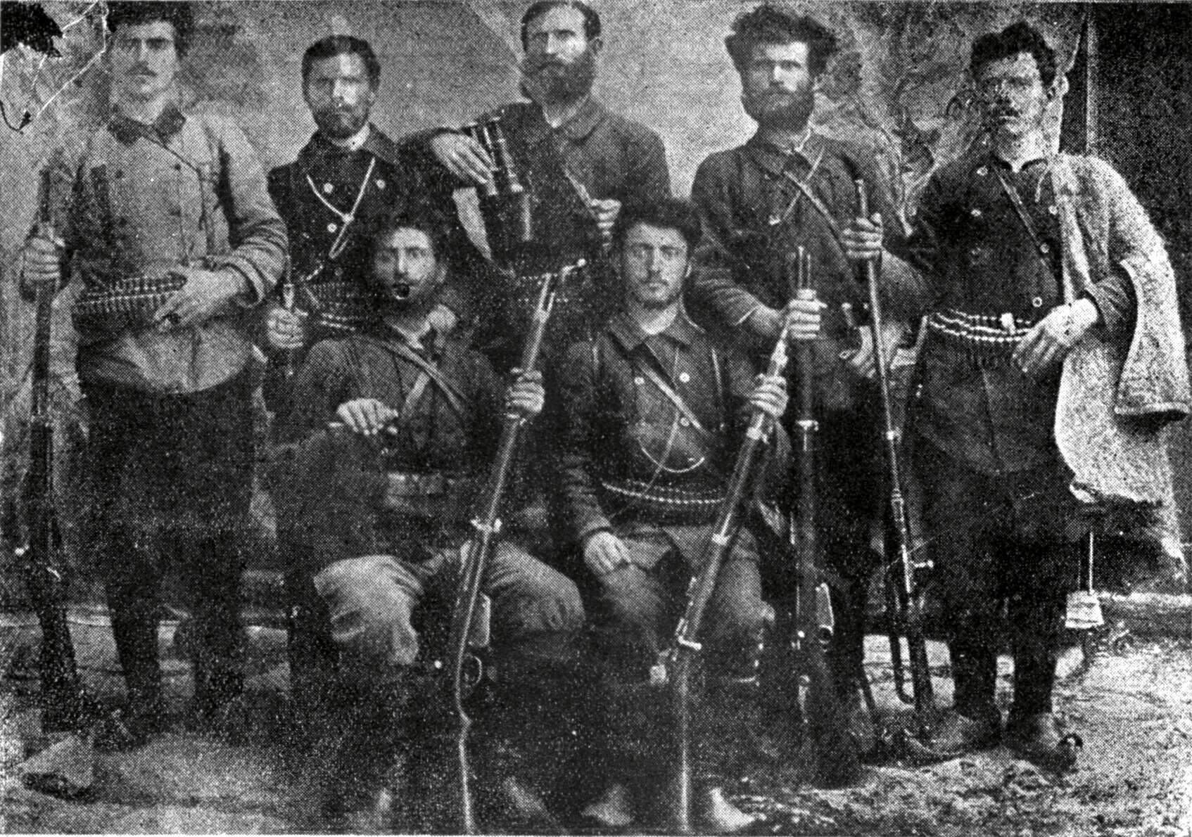 Macedonian Revolutionaries